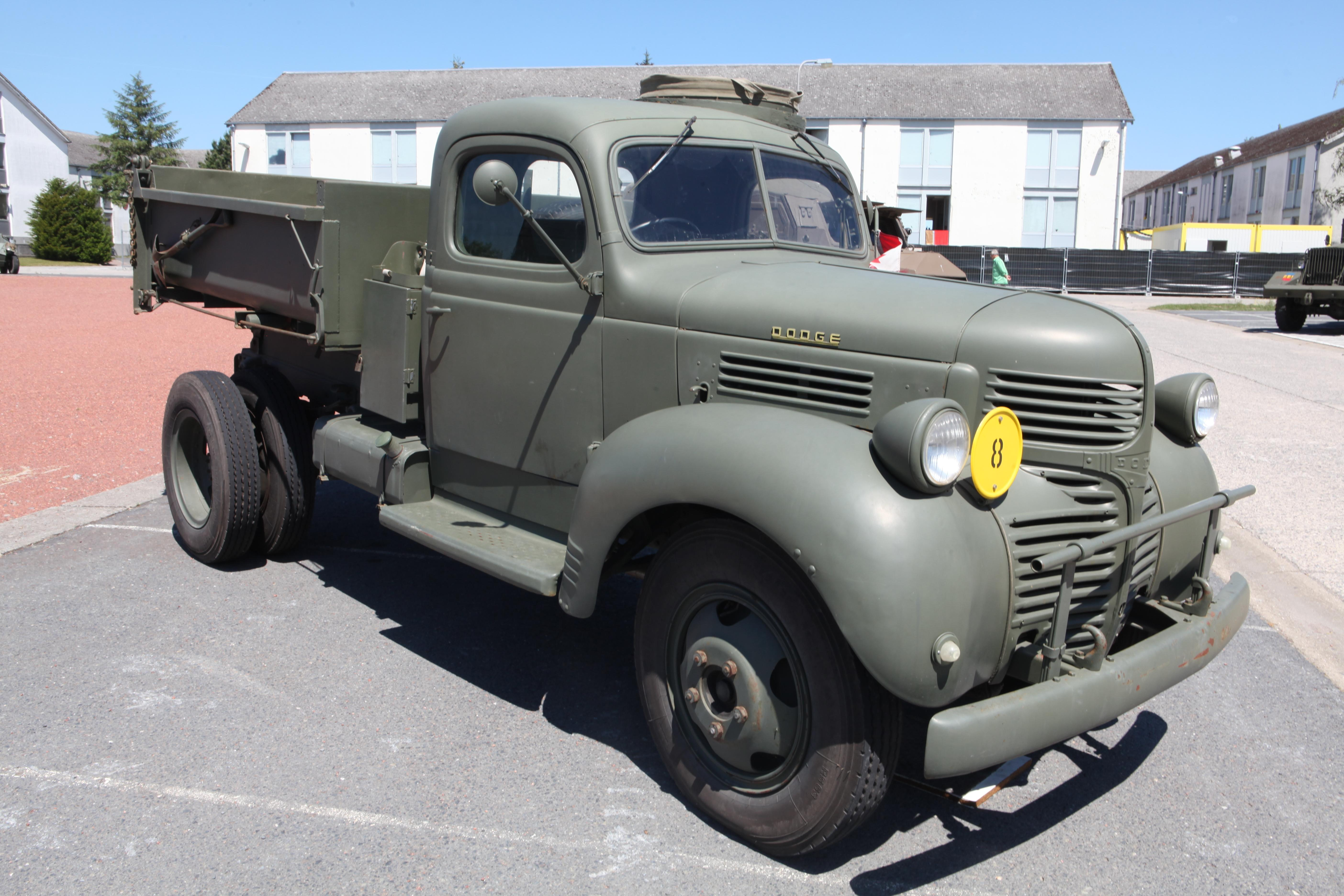 Dodge D 15